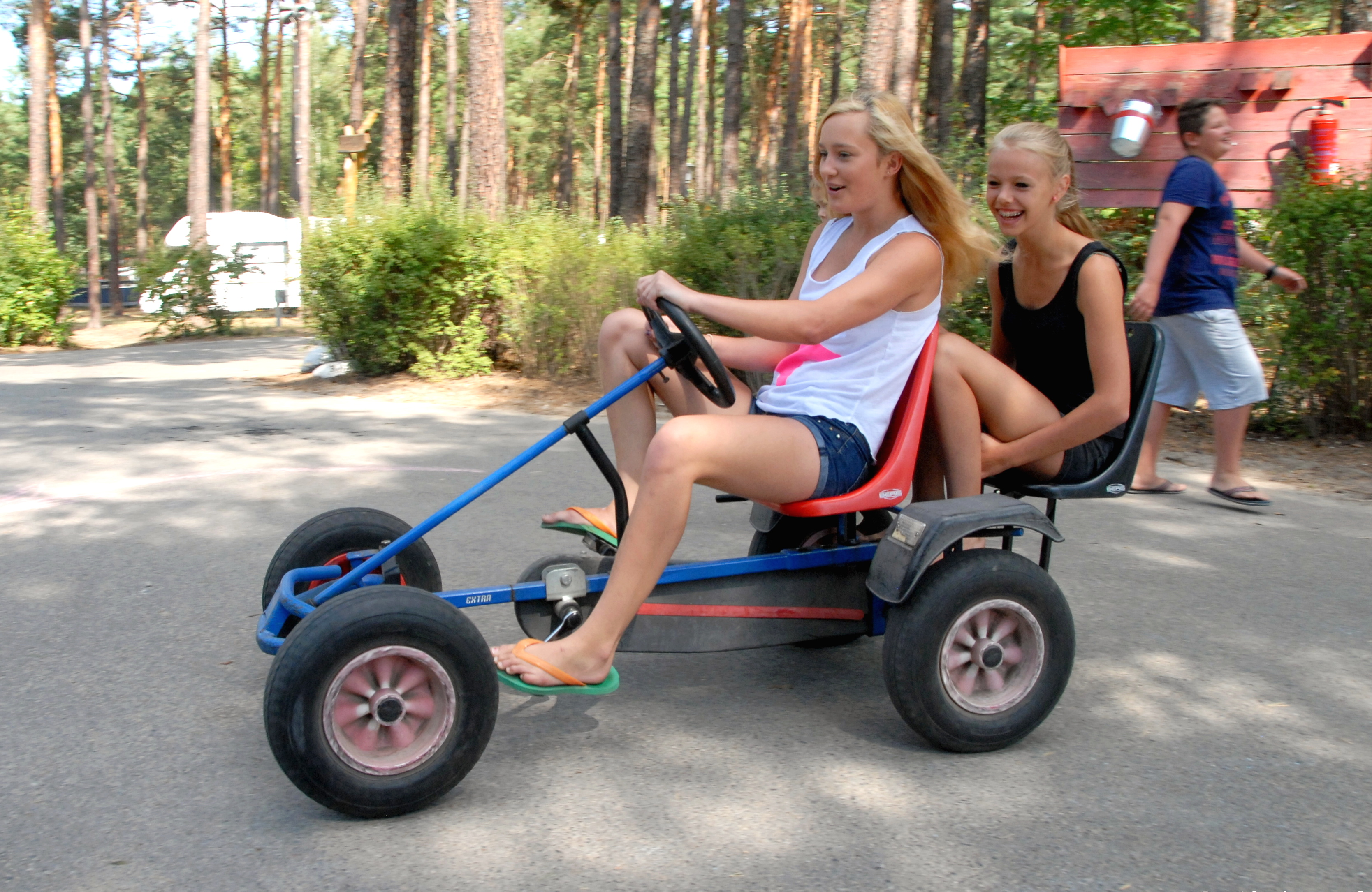 Kettcar mit einem Zweitsitz